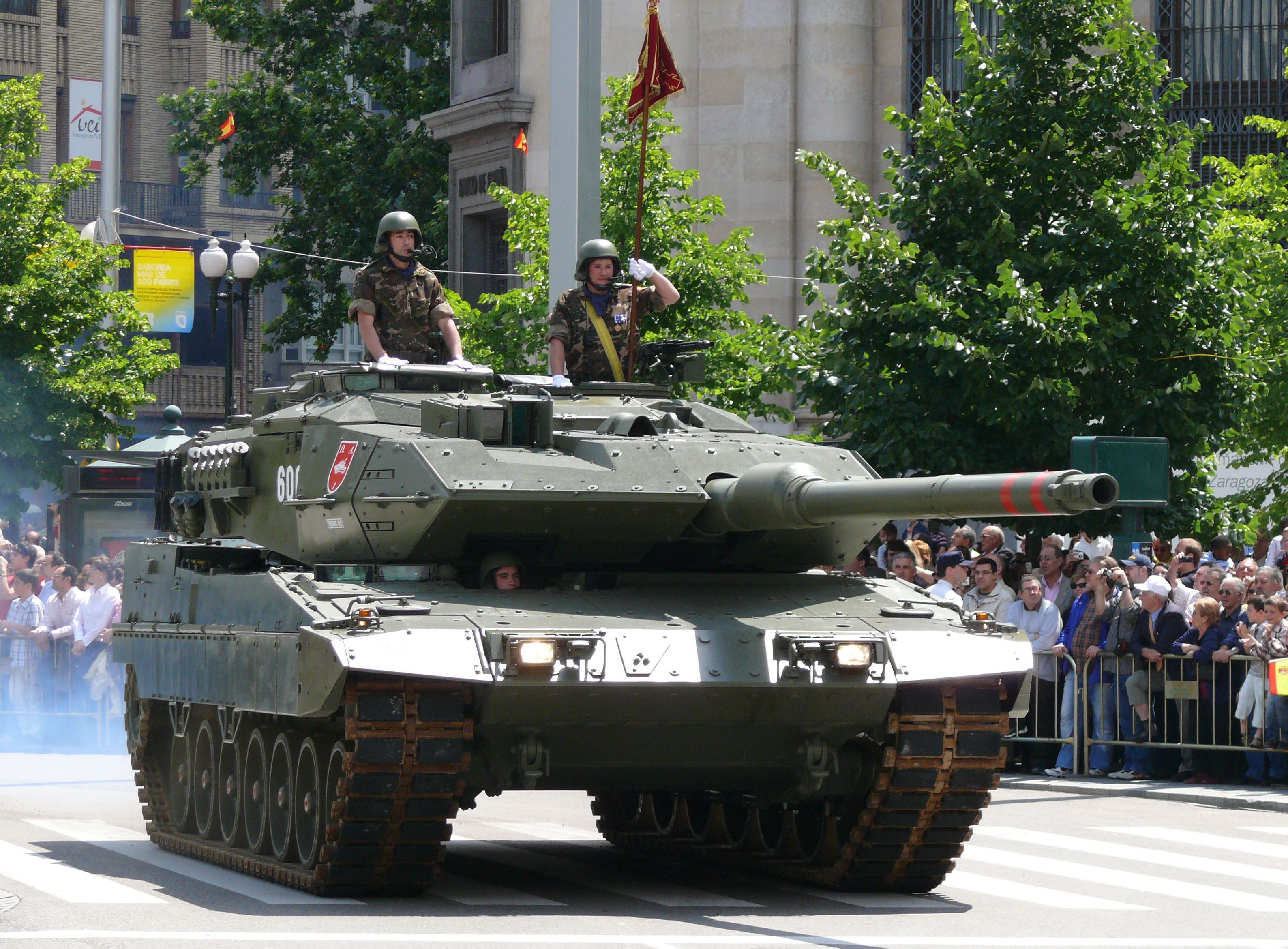 Leopard 2. Desfile de las Fuerzas Armadas. España, 01-06-2008.